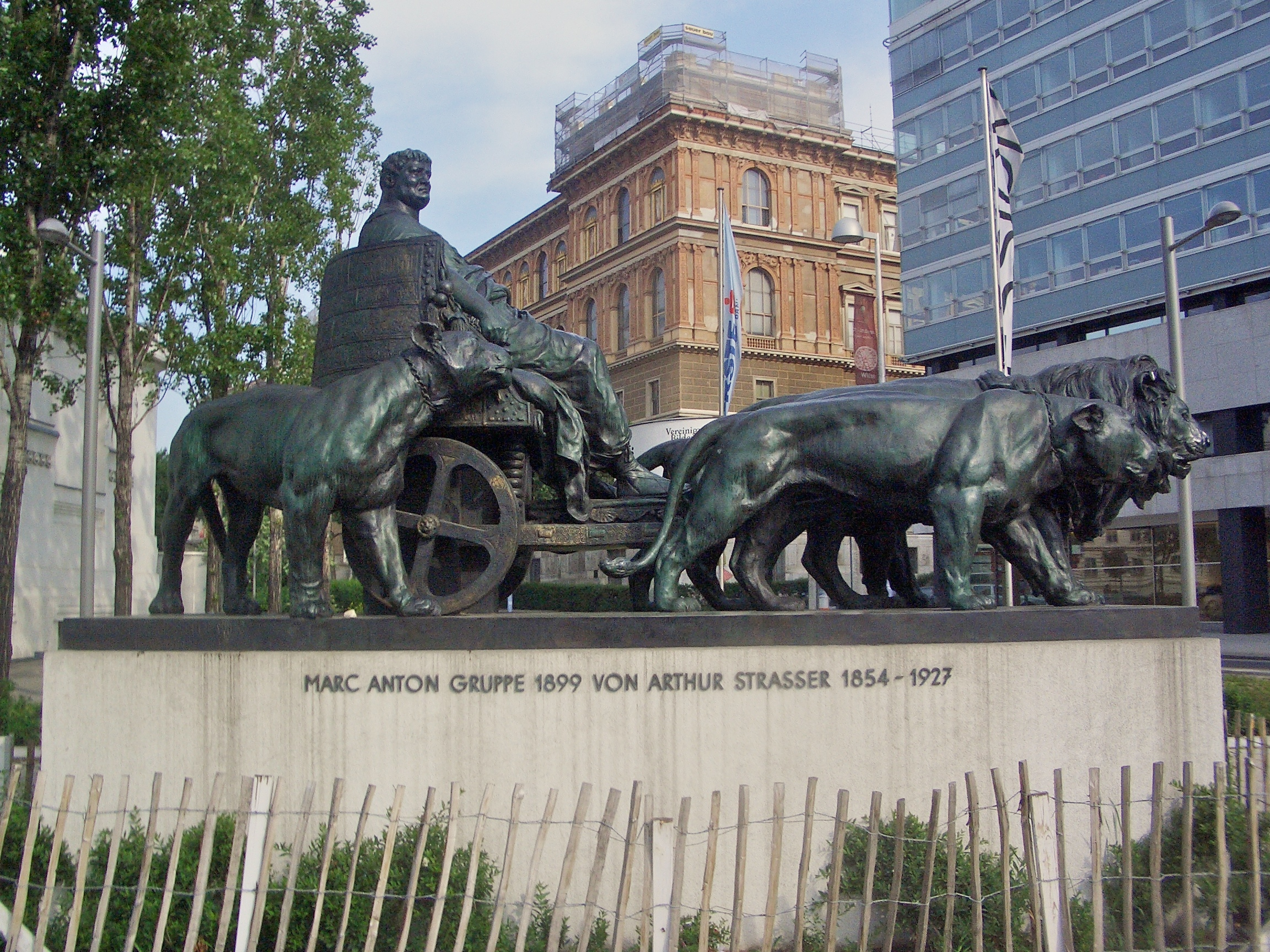 Marc Anton Gruppe von Arthur Strasser